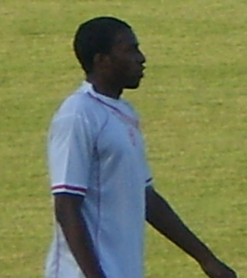 Jordan Lotiès, footballeur professionnel